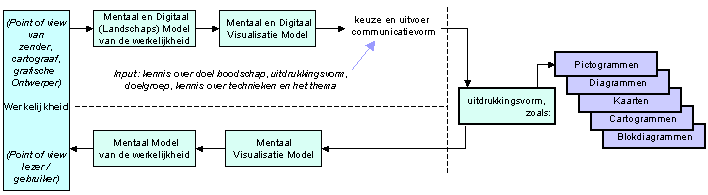 Eigen gemaakte media. De figuur geeft aan het belang van mentale (en ook digitale) modellen bij de totstandkoming én ook de interpretatie van de uitdrukkingsvormen. Het bovenste deel is het deel waar de ontwerper / cartograaf zich mee bezig houdt, het onderste deel de gebruiker / lezer. Slechts het rechter deel is een gezamenlijk deel (bv: het pictogram van een camping of de kaart van een camping). Zelfs de werkelijkheid ('wat is een camping') kan verschillen.